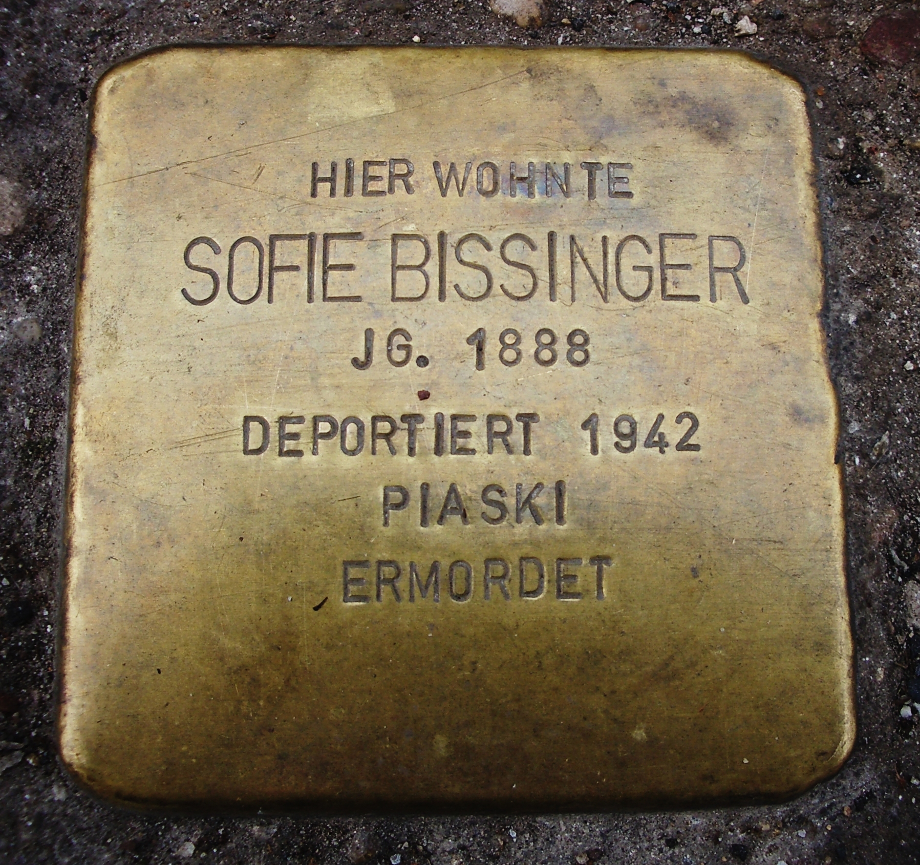 Der Stolperstein für Sofie Bissinger befindet sich in der Augsburger Straße 34 in Neu-Ulm, Bayern.